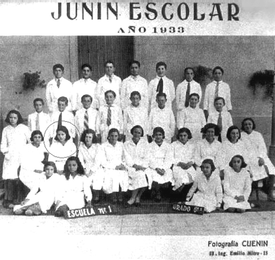 Eva Perón. Foto escolar. 5to. Grado. Junín. 1933. Eva se encuentra sentada a la izquierda (señalada)